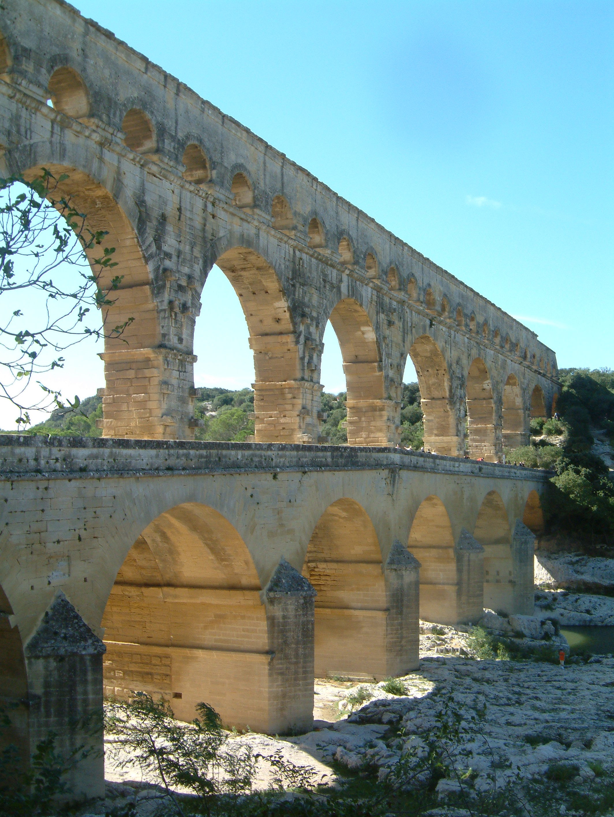 Pont du Gard - Rest der römischen Wasserleitung nach Nîmes